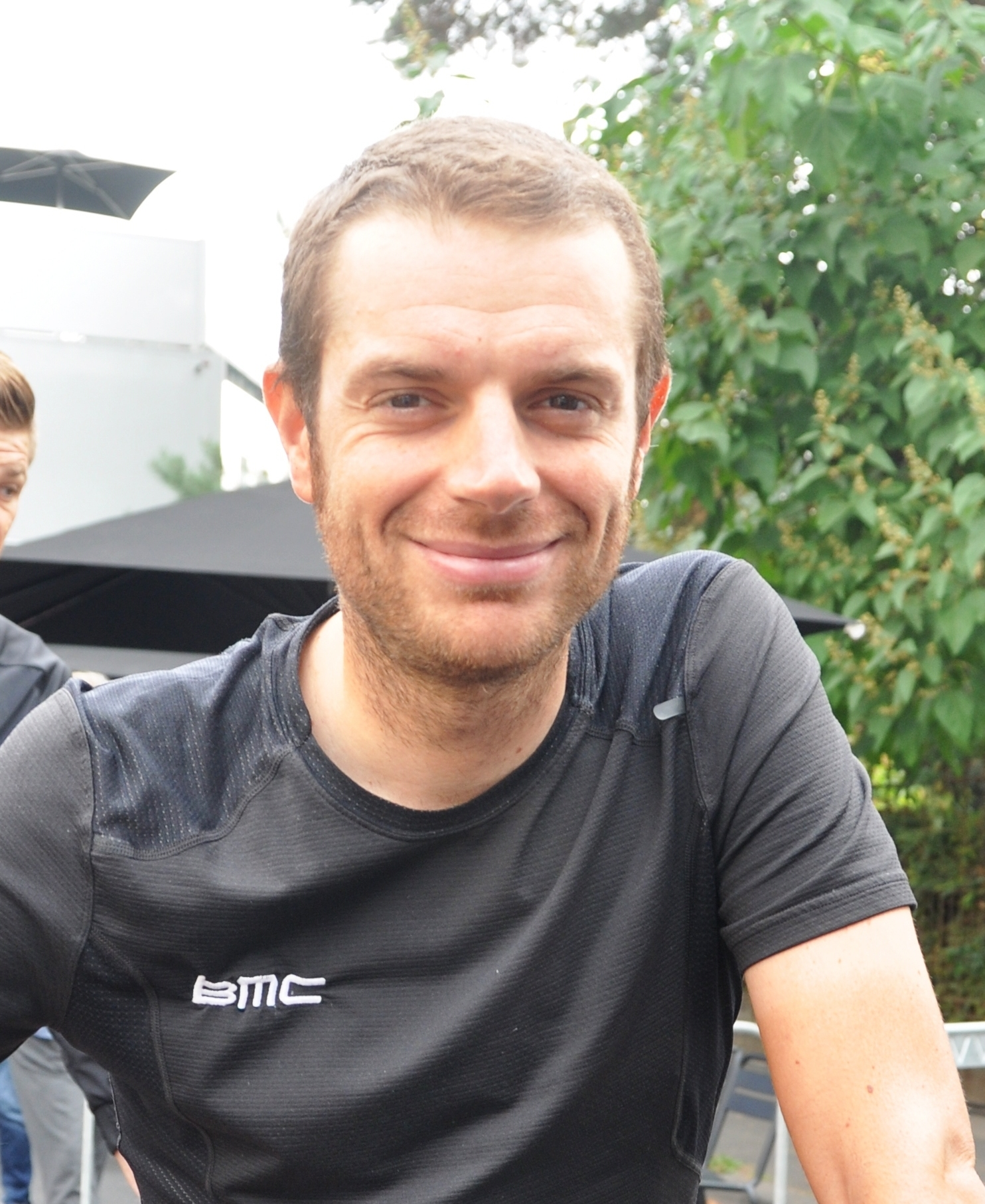 Damiano Caruso, italienischer Radrennfahrer